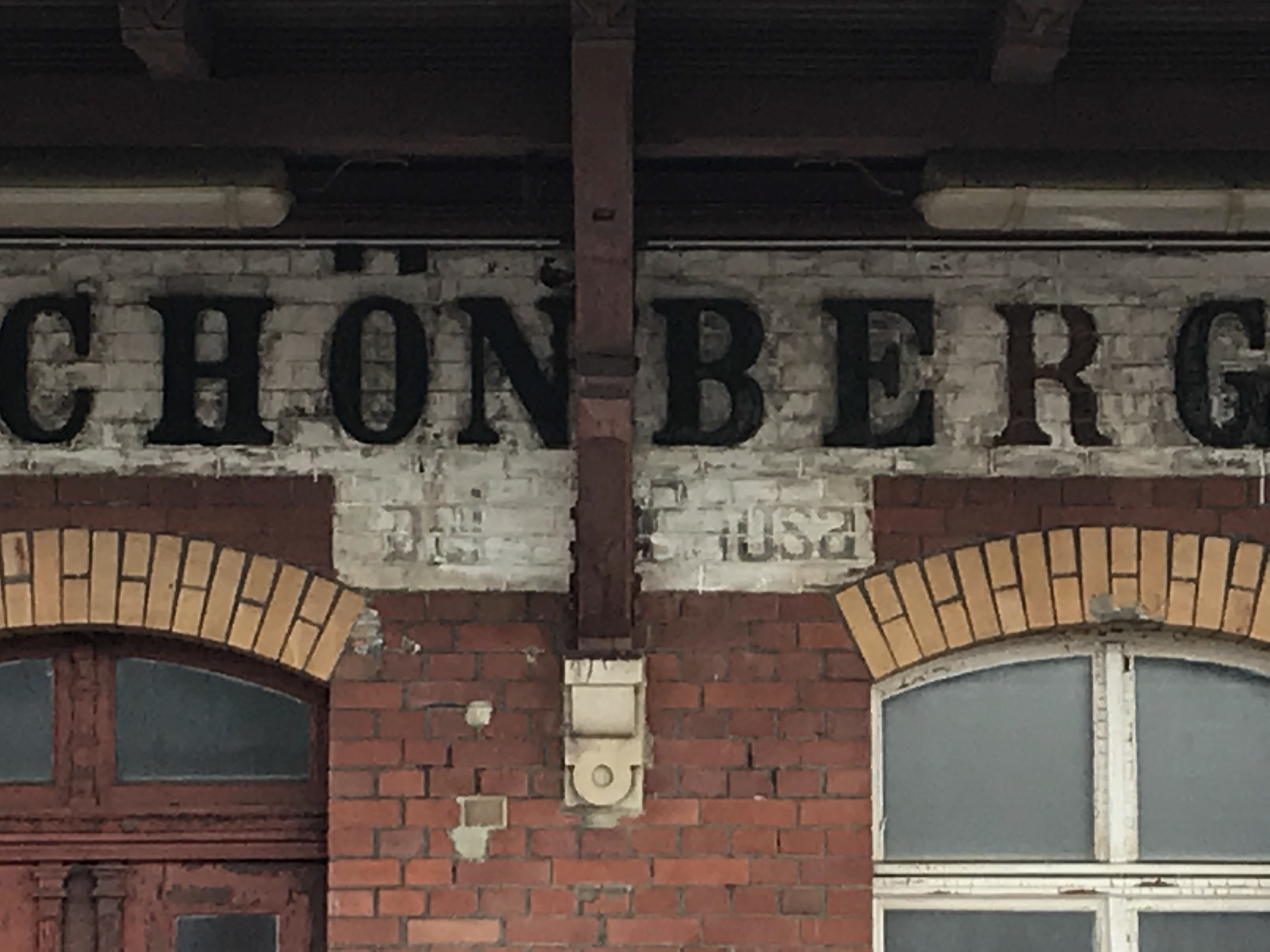 Alter Name am Stationsgebäude (2018)